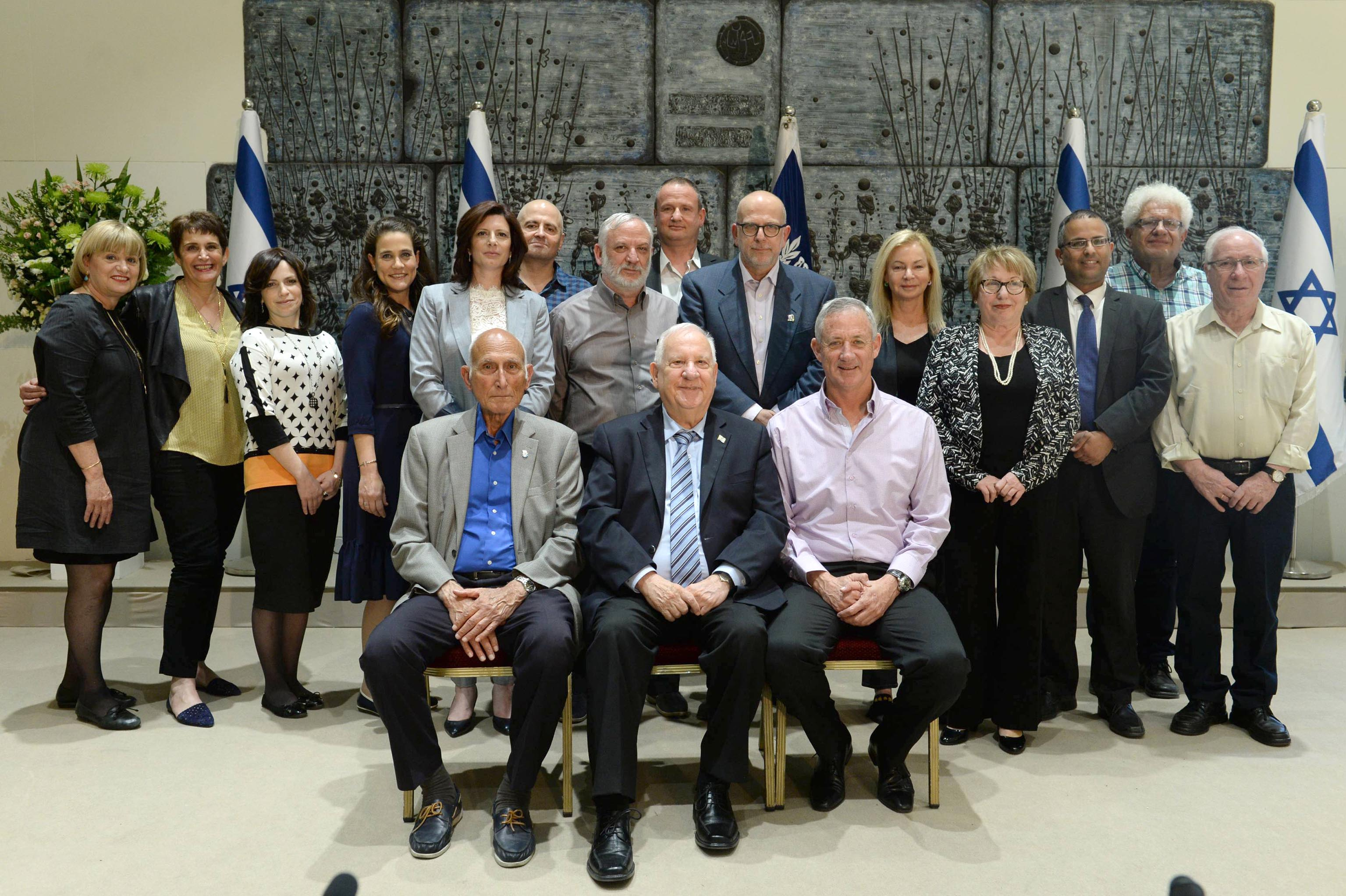 נשיא מדינת ישראל ראובן ריבלין במפגש לכינון הוועדה ל"אות הנשיא למתנדב", שנערך בבית הנשיא. למטה מימין לשמאל: יו"ר הוועדה המייעצת לאות הנשיא רא"ל (במיל') בני גנץ, נשיא המדינה, ממלא מקום יו"ר המועצה הלאומית להתנדבות ד"ר ברוך לוי. למעלה: מנכ"ל בית הנשיא הראל טובי וחברי הוועדה.